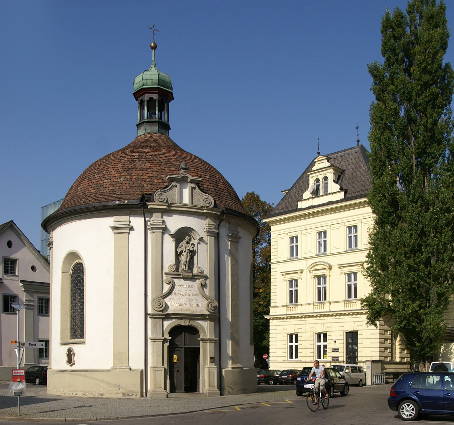 Die Kapelle des hl. Johannes Nepomuk wurde 1757 von Johann Michael Beer von Bildstein erbaut. In Bregenz, Innenstadt